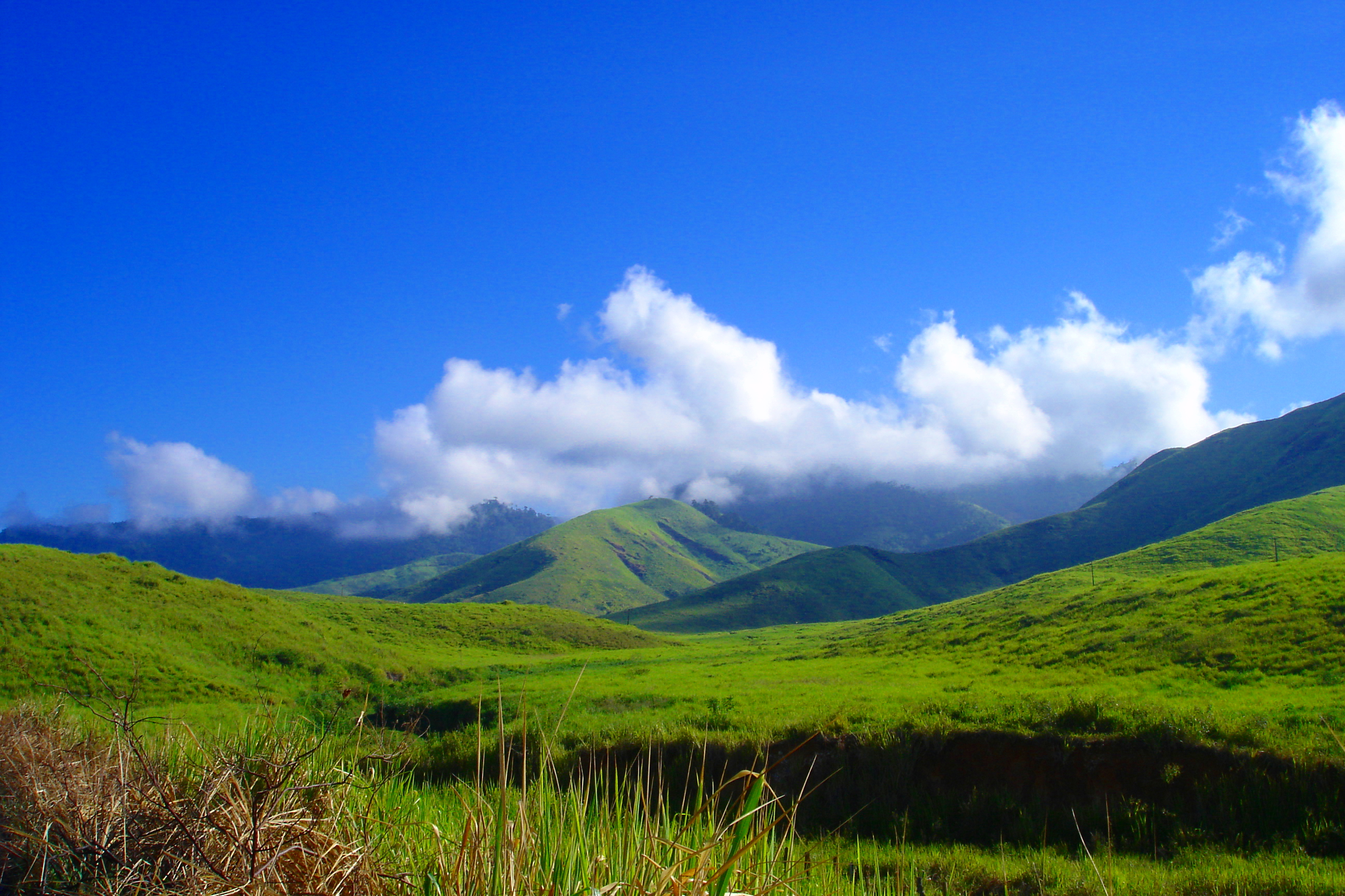 Serra do Marçal, próximo a Vitória da Conquista/BA, Rodovia BA 263 / BR-415